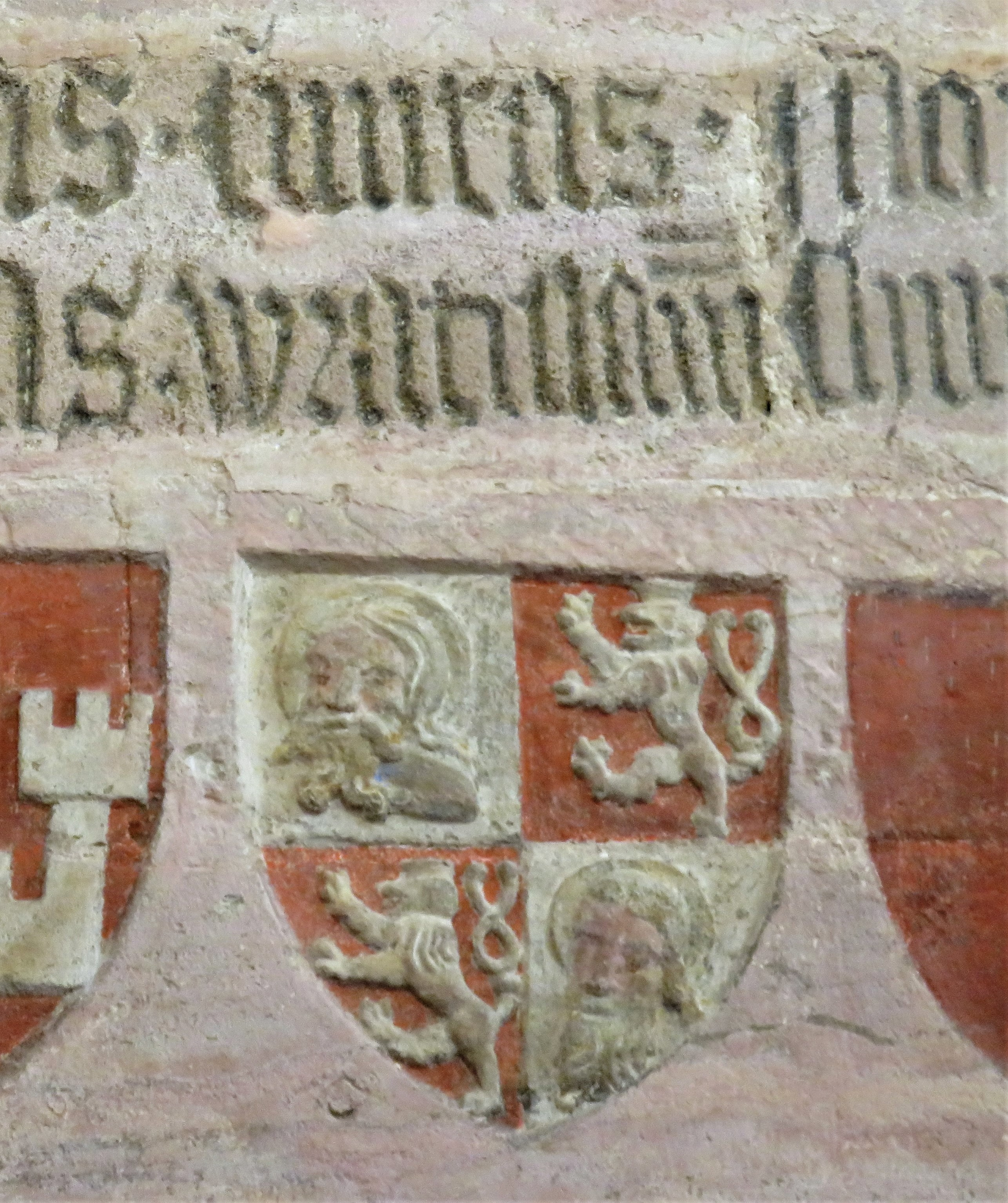 Znak Vratislavi (Civitas Wratislaviensis; mezi znaky Prahy a Kutné Hory) z erbovního sálu na hradě Lauf an der Pegnitz z doby císaře Karla IV. (kolem 1360).